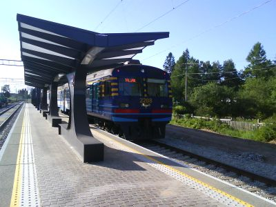 Aegviidu